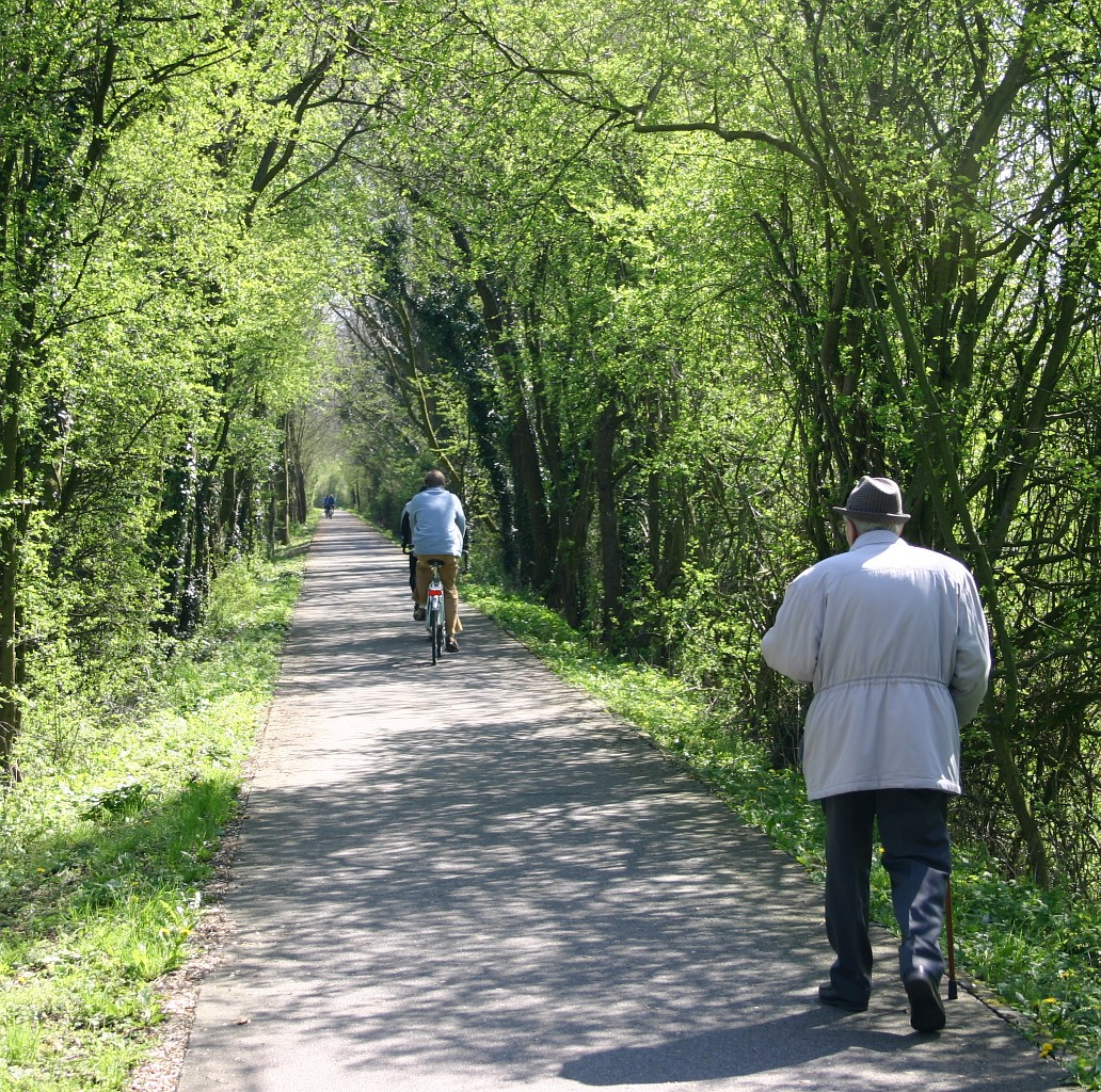 Radweg auf der ehemaligen Vennbahntrasse in Aachen, hier in Kornelimünster Richtung Walheim